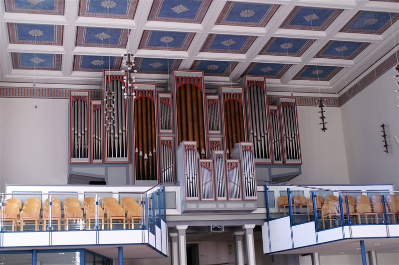 Prospektansicht Kreienbrink Orgel Waldbröl 1984